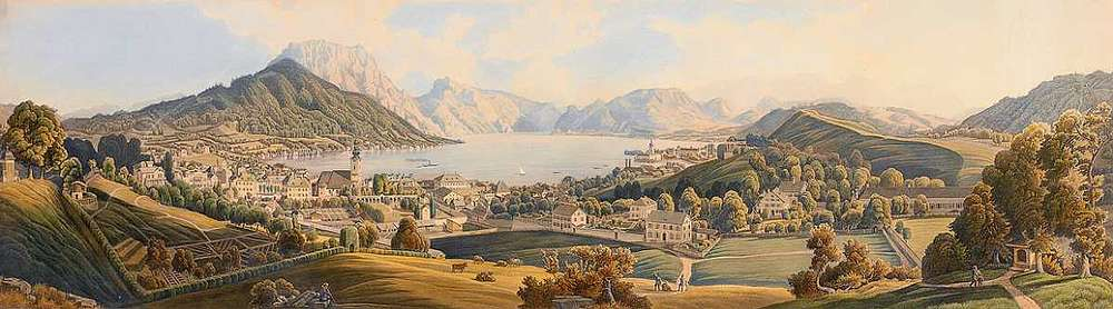 Gmunden am Traunsee, Austria